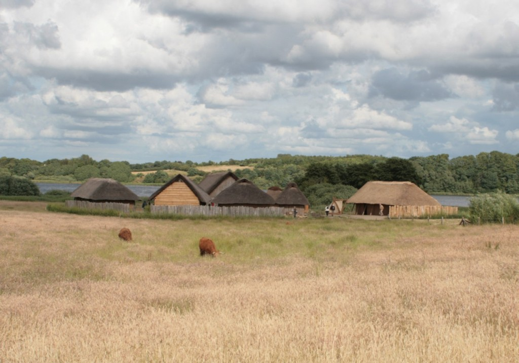 Sieben rekonstruierte Wikinger-Häuser in Haithabu. Außengelände vom Wikinger-Museum Haithabu.